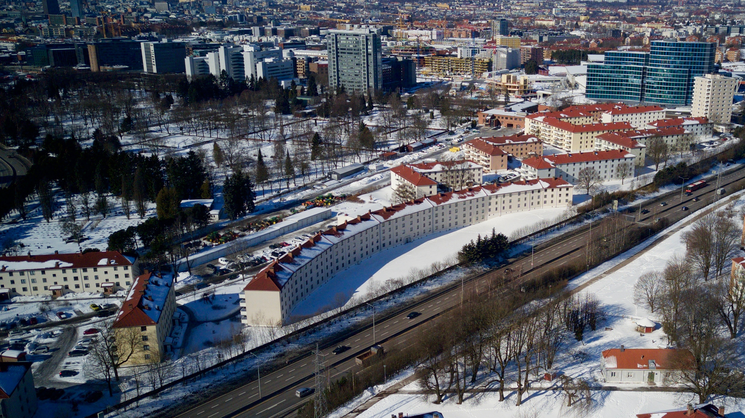 Agmund Bolts vei, Teisen Vest Borettslag, Adolf Hedins vei, Teisen gård.